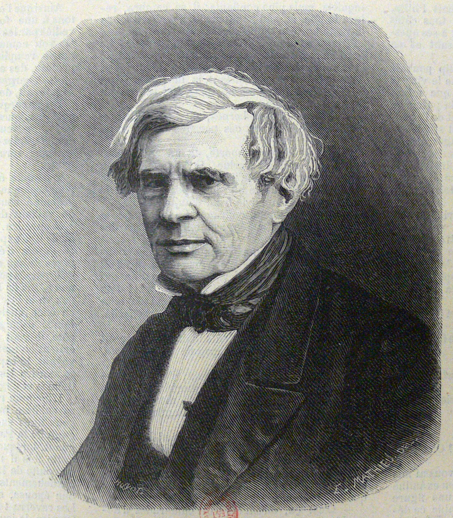 Portrait de Pierre-Sébastien Laurentie par Huyot d'après E. Mathieu (bois de bout). Publié dans La France illustrée, n° 64.